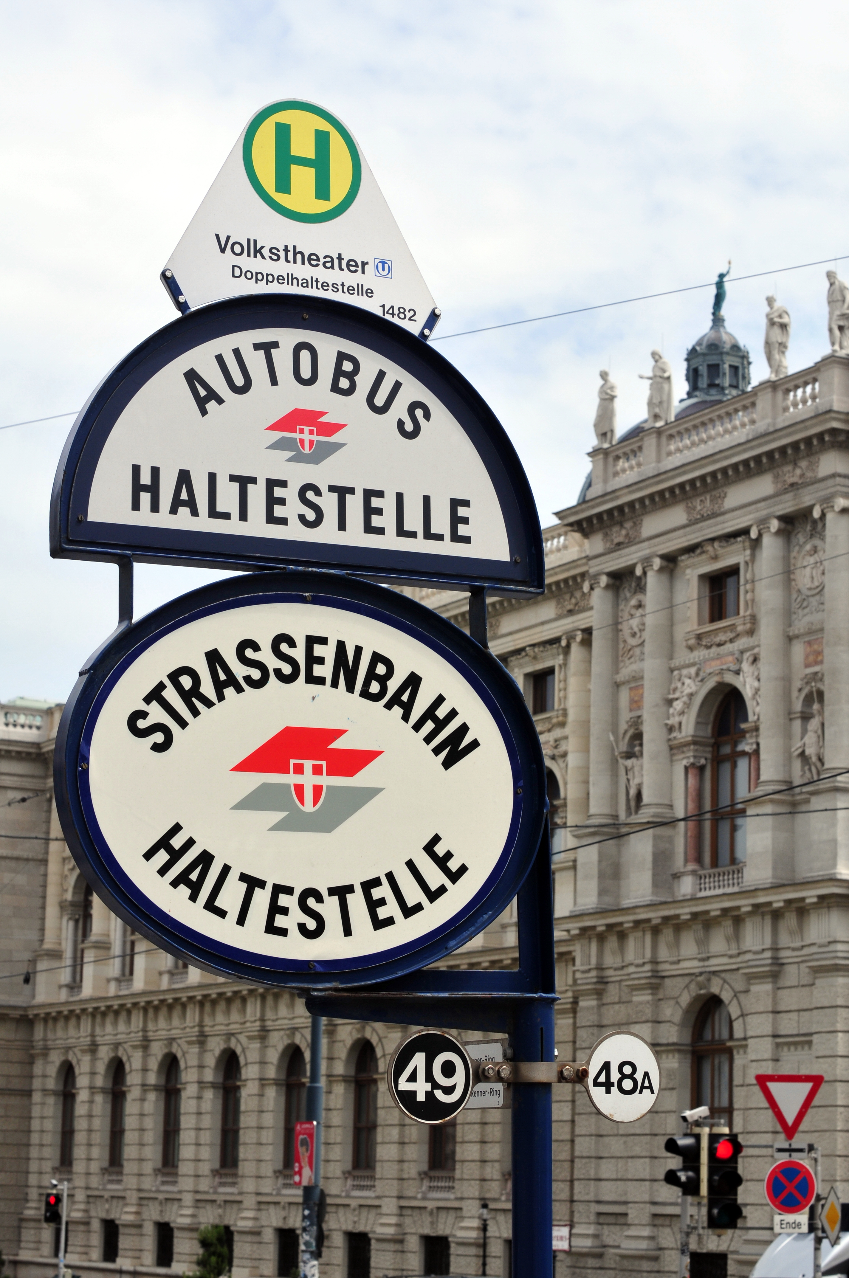 Wien